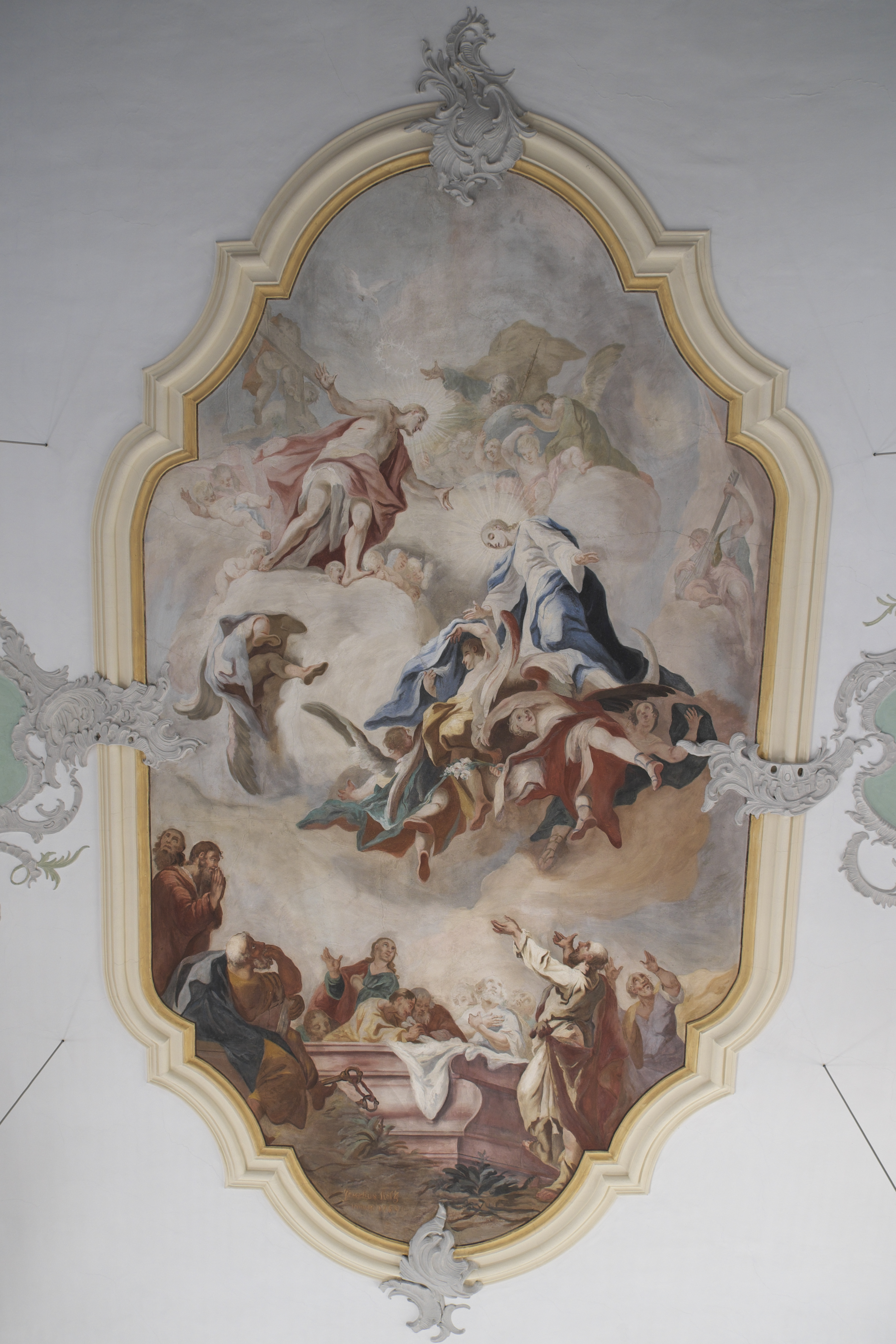 Katholische Pfarrkirche St. Georg in Hailtingen (Dürmentingen) im Landkreis Biberach (Baden-Württemberg/Deutschland), Deckenmalerei